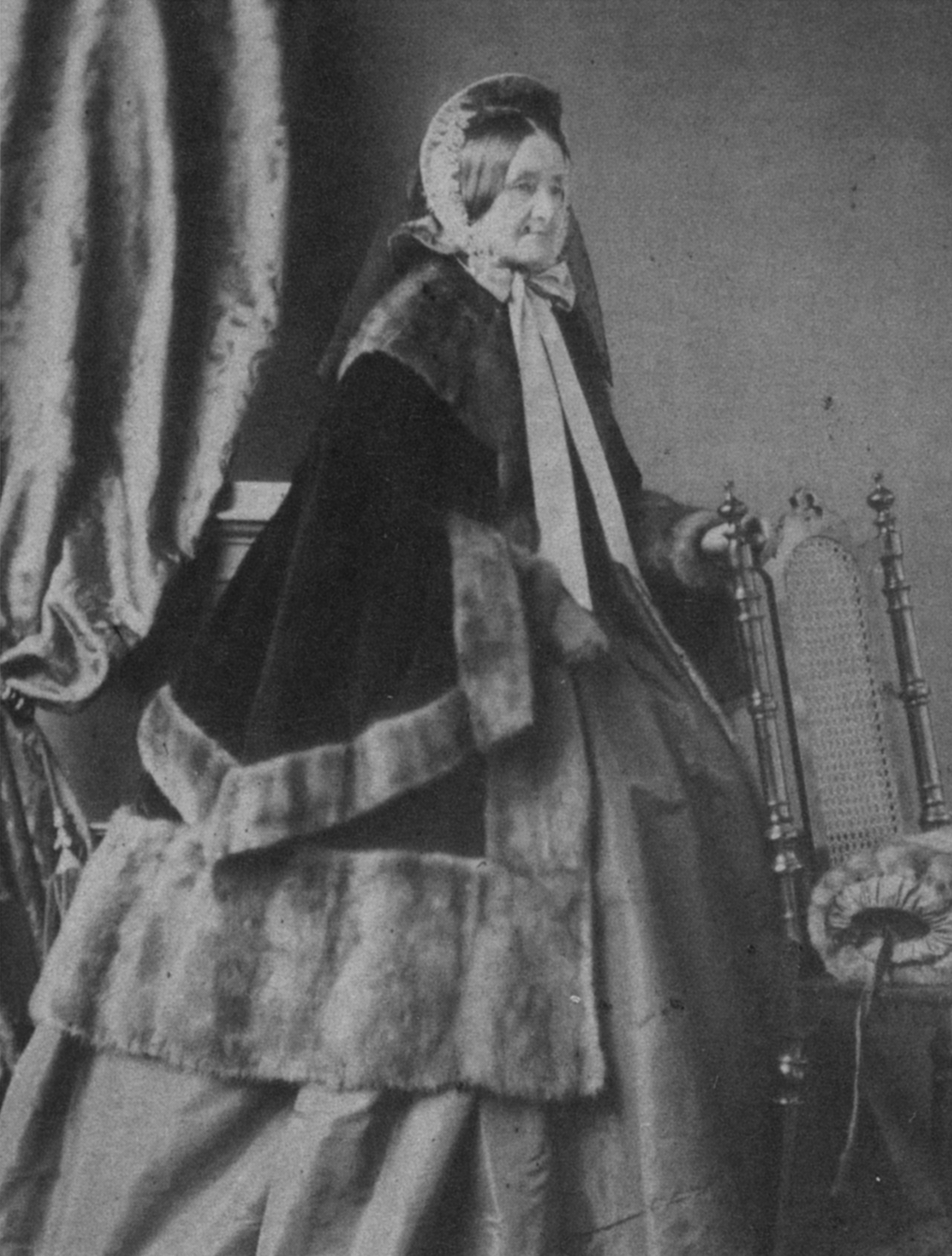 Petschar, Friedlmeier, Steiermark in alten Fotografien, Ueberreuther Verlag Wien.